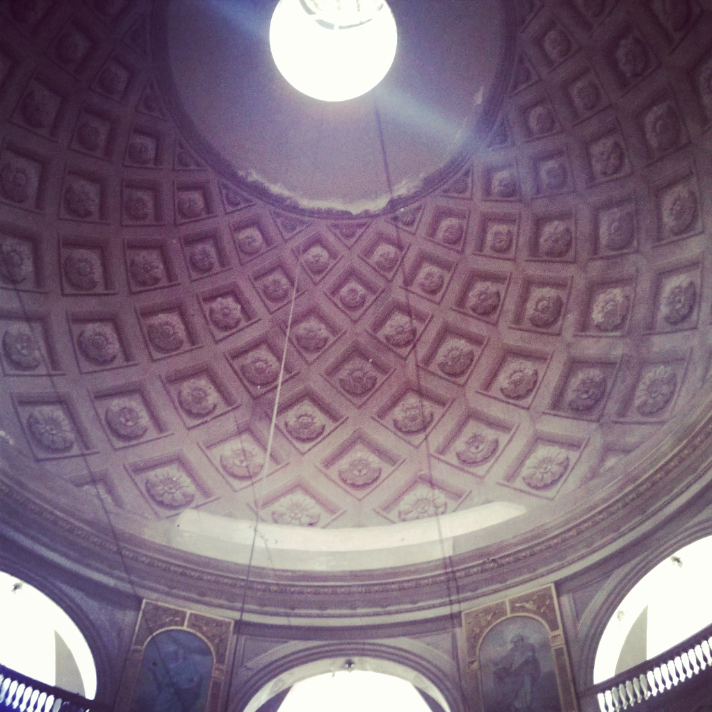 Cúpula Ornamentacion